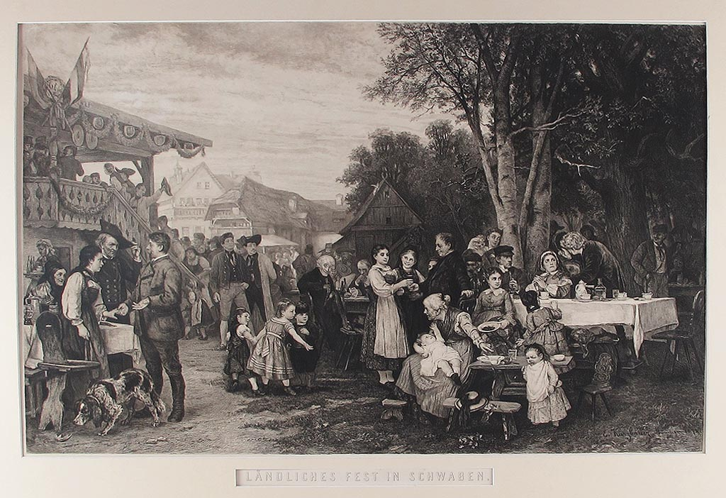 Ländliches Fest in Schwaben. Radierung von W. Krauskopf nach dem Gemälde von Kurzbauer, gedruckt bei O. Felsing in Berlin, 19. Jh. Bildgr. 51 x 81 cm